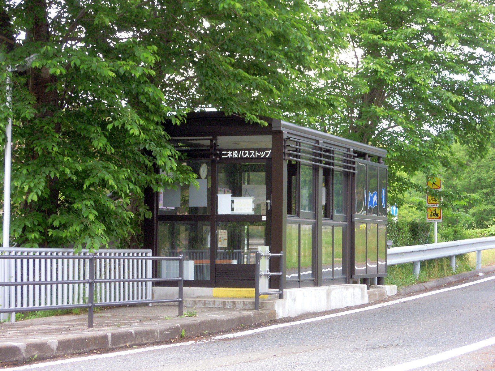 福島県二本松市の東北自動車道二本松インターチェンジに併設されている二本松バスストップ（下り線）。